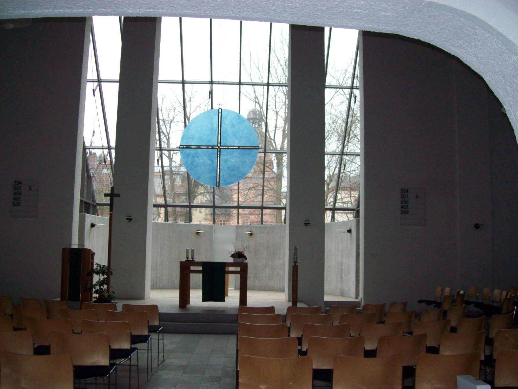 Christuskirche Aschaffenburg - Altar, Taufkapelle